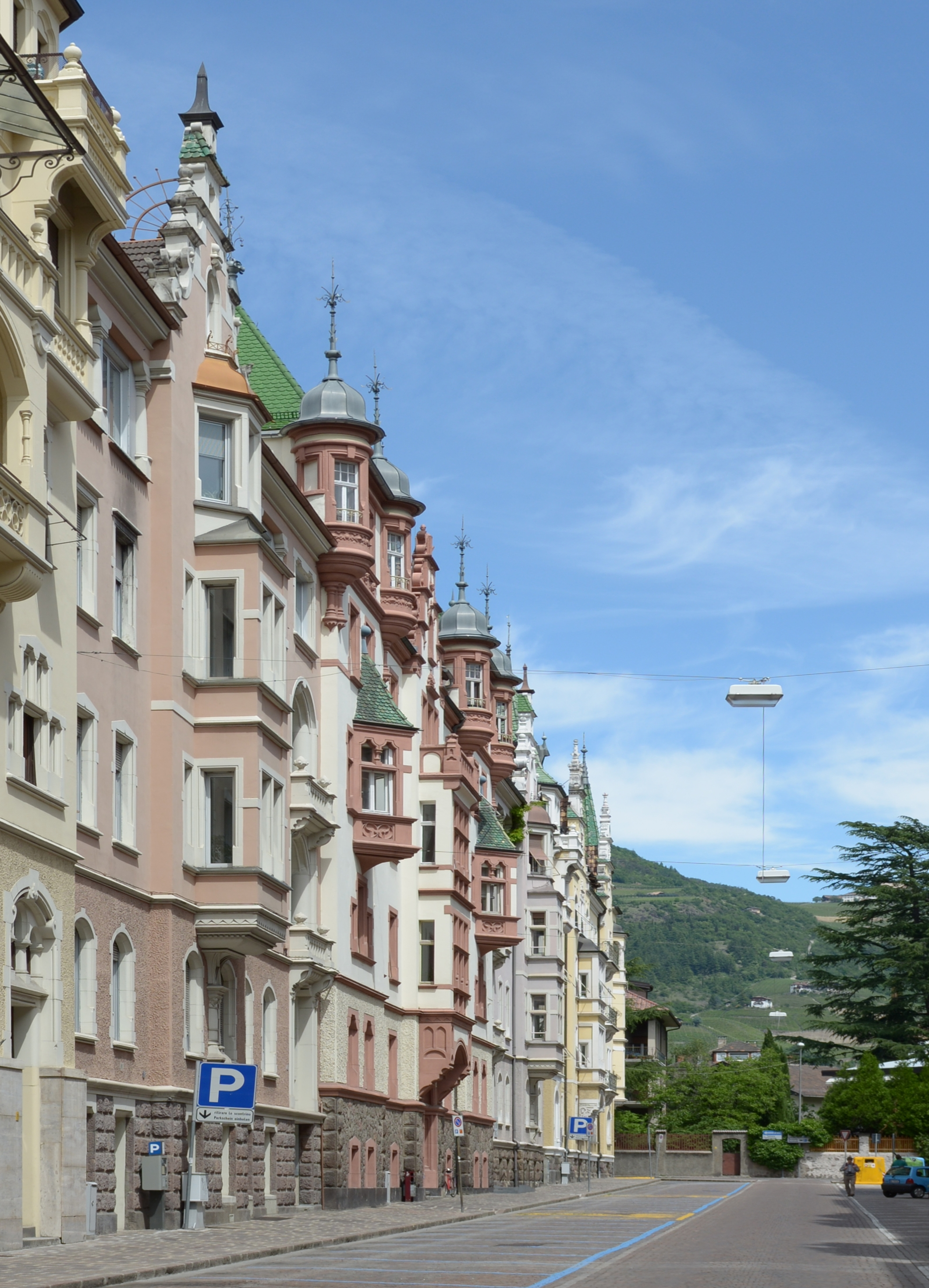 Gebäude des Historismus in der Sparkassenstrasse in Bozen